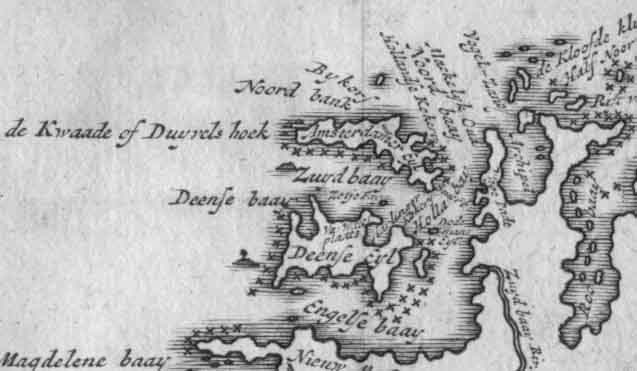 Eiland Amsterdam